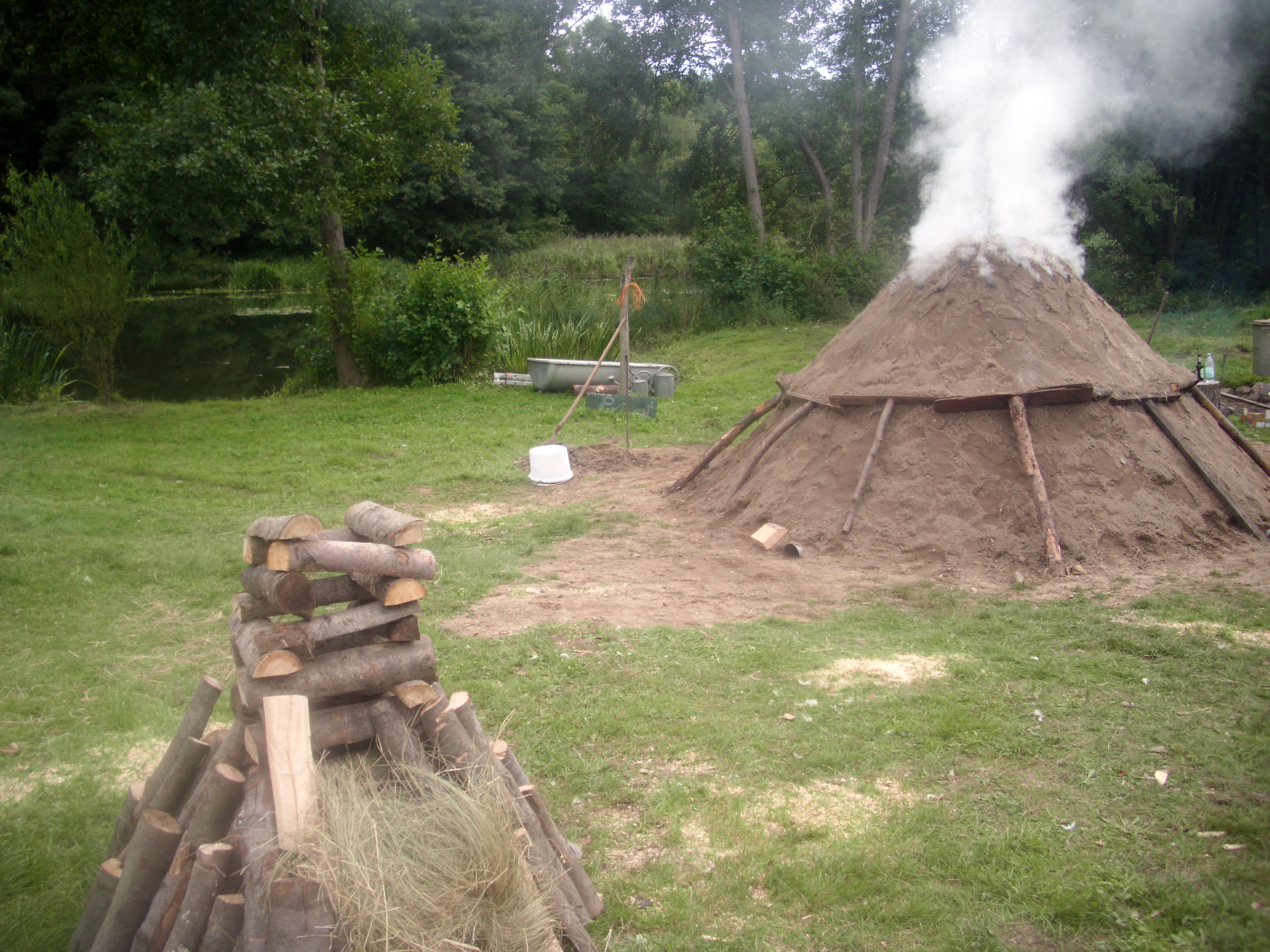 Meiler und kleiner Schaumeiler des Kienstubbenvereins 2001 e.V. Groß Lindow, angelegt an der Ragower Mühle